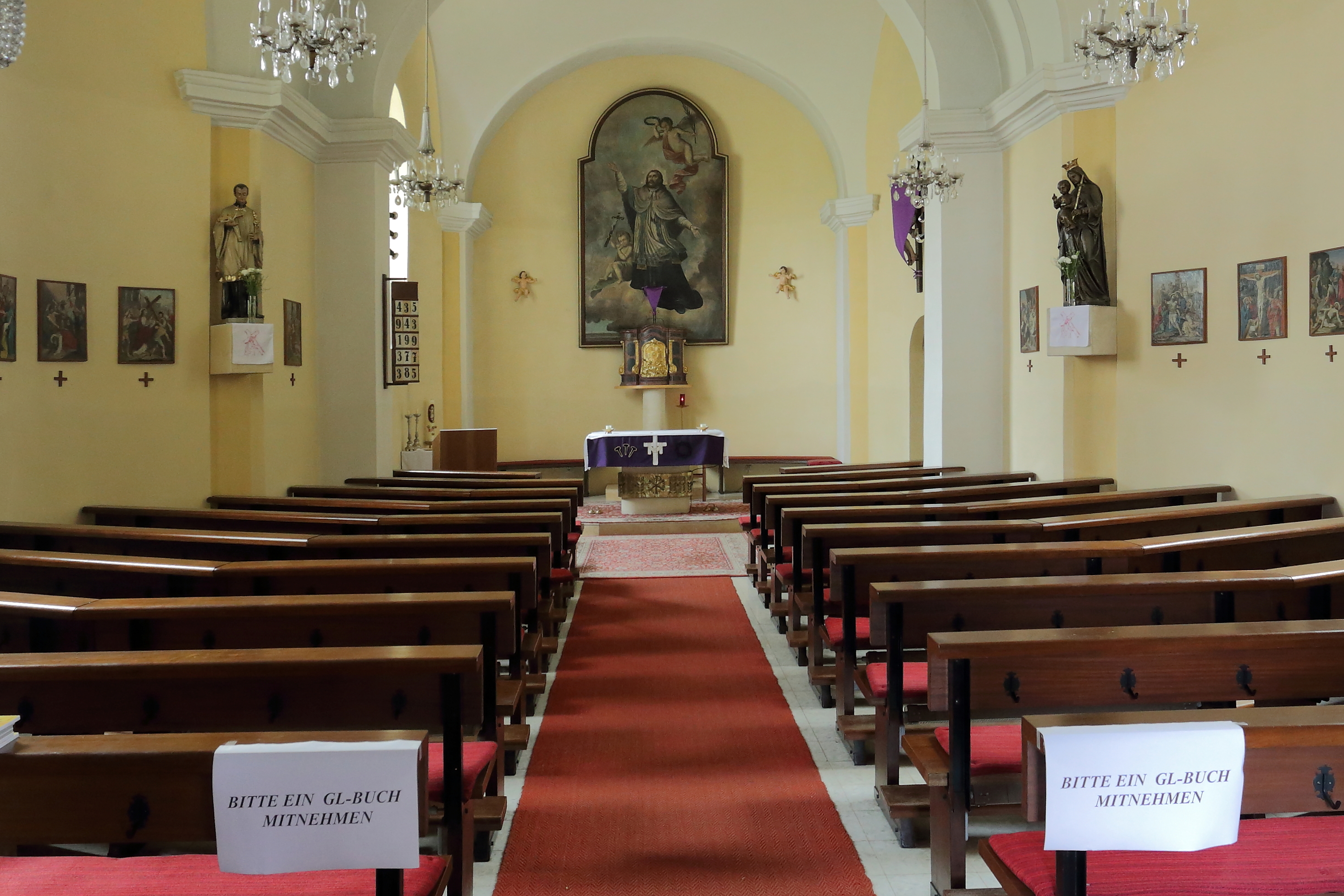 Innenansicht der katholischen Pfarrkirche hl. Johannes Nepomuk in Traunfeld, ein Ortsteil der niederösterreichischen Gemeinde Hochleithen.